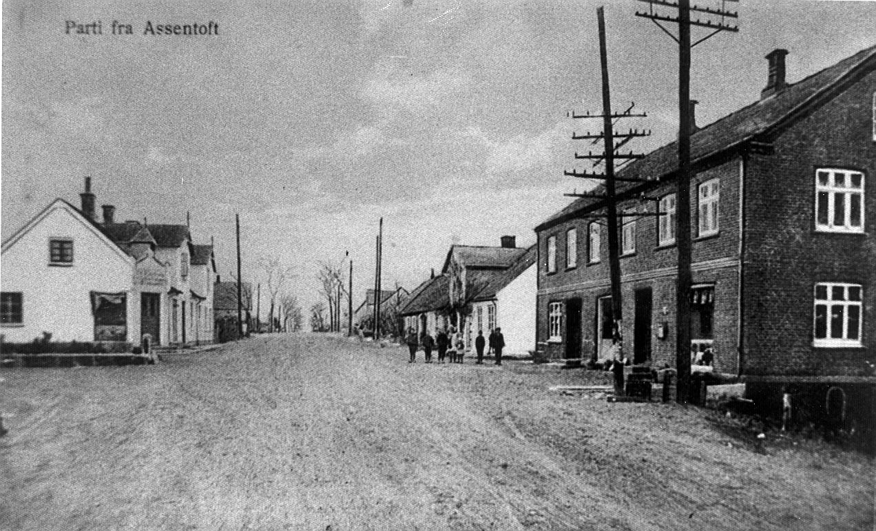 Storegade, Assentoft